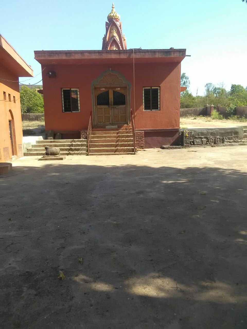 काळुबाई मंदिर वाजेघर बुद्रुक